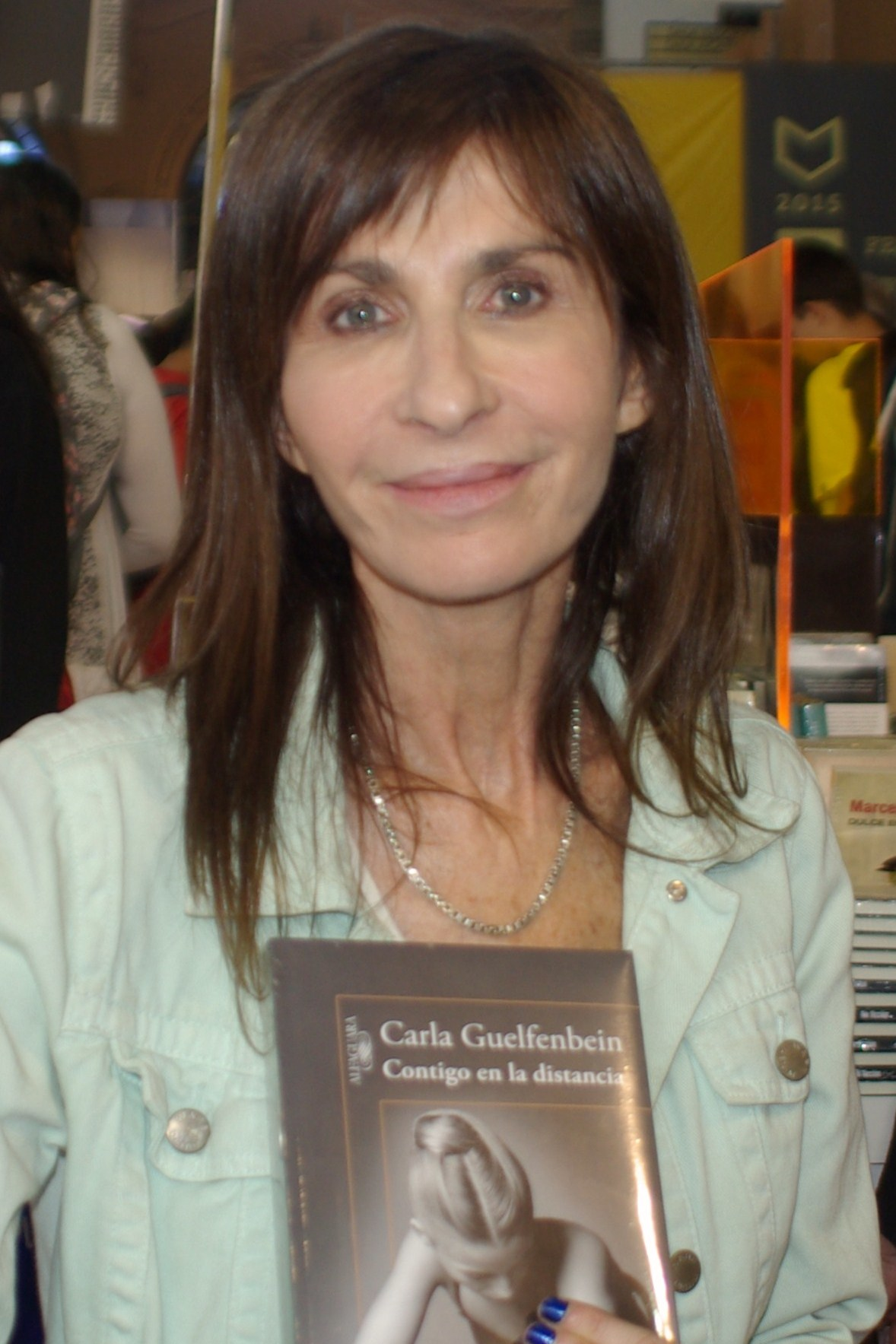 La escritora chilena Carla Guelfenbein en la Feria Internacional del Libro de Santiago 2015